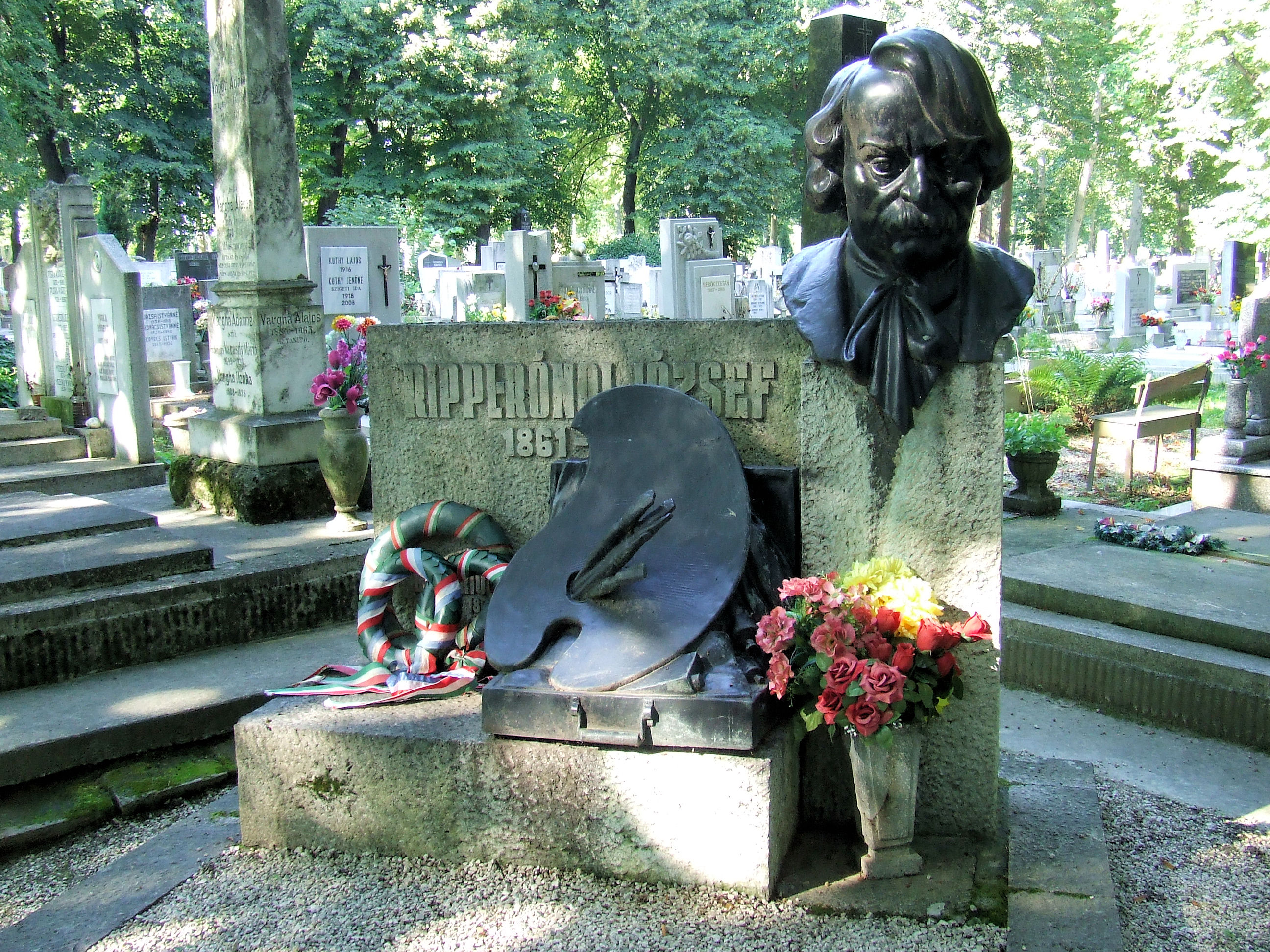 Rippl-Rónai József sírja a kaposvári Keleti temetőben. Lányi Dezső (1879–1951) szobrászművész alkotása (1936). A Nemzeti Sírkert része